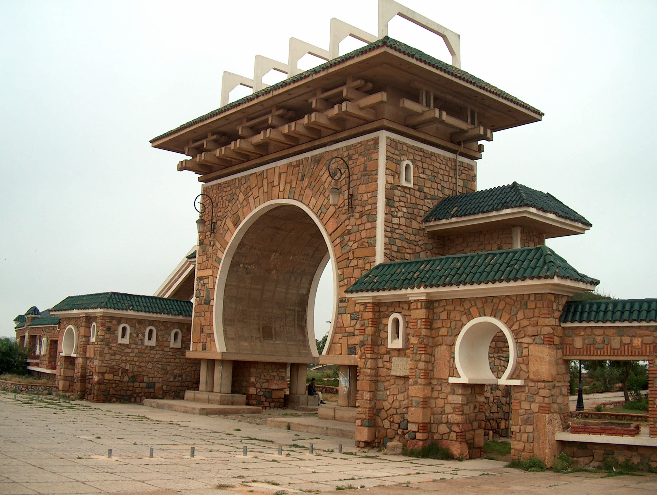 Mostaganem: Park El Arsa. Mostaganem: parc d'El Arsa.